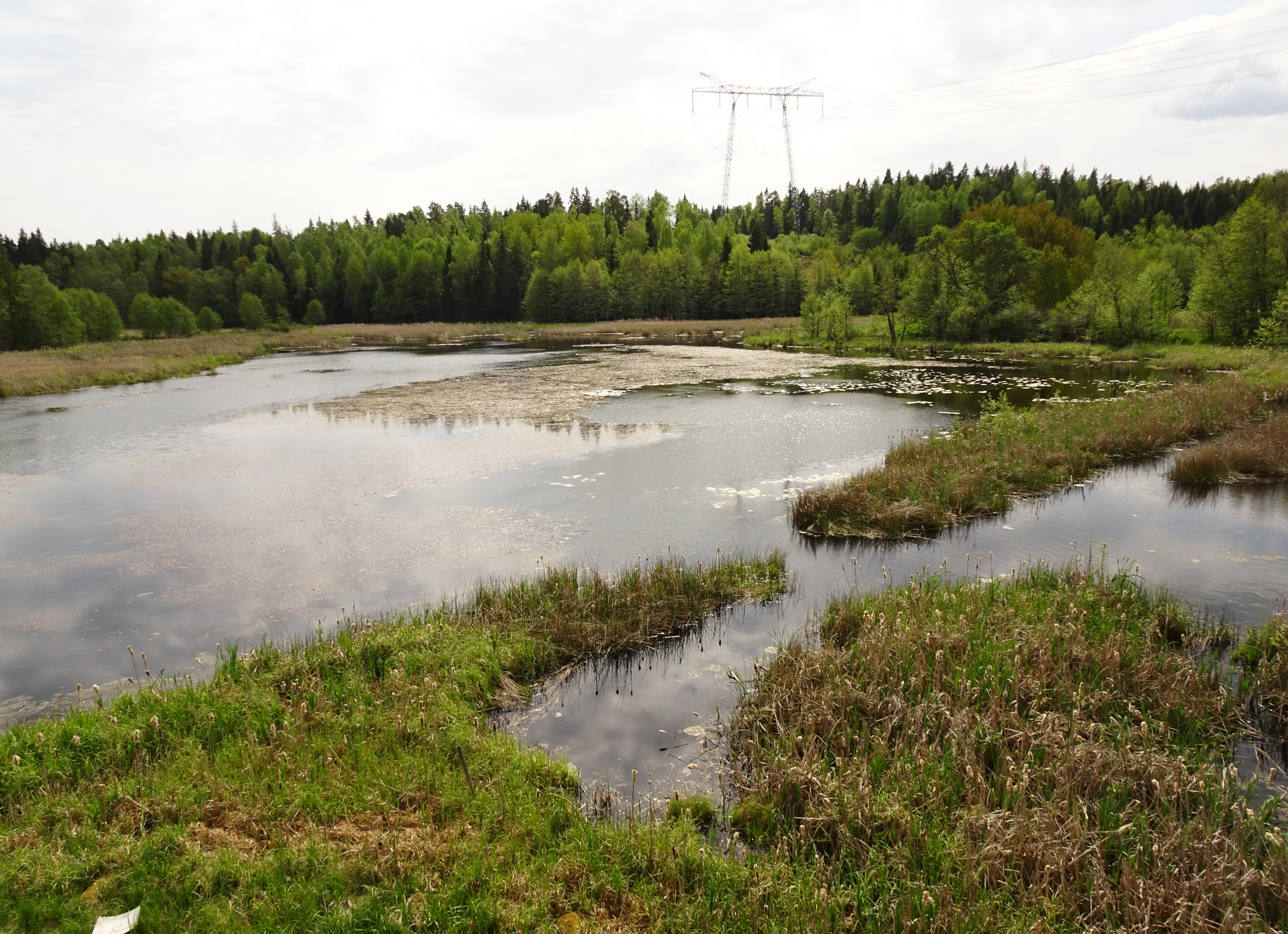 Dalkarlssjön ligger inom Vällinge militärområde